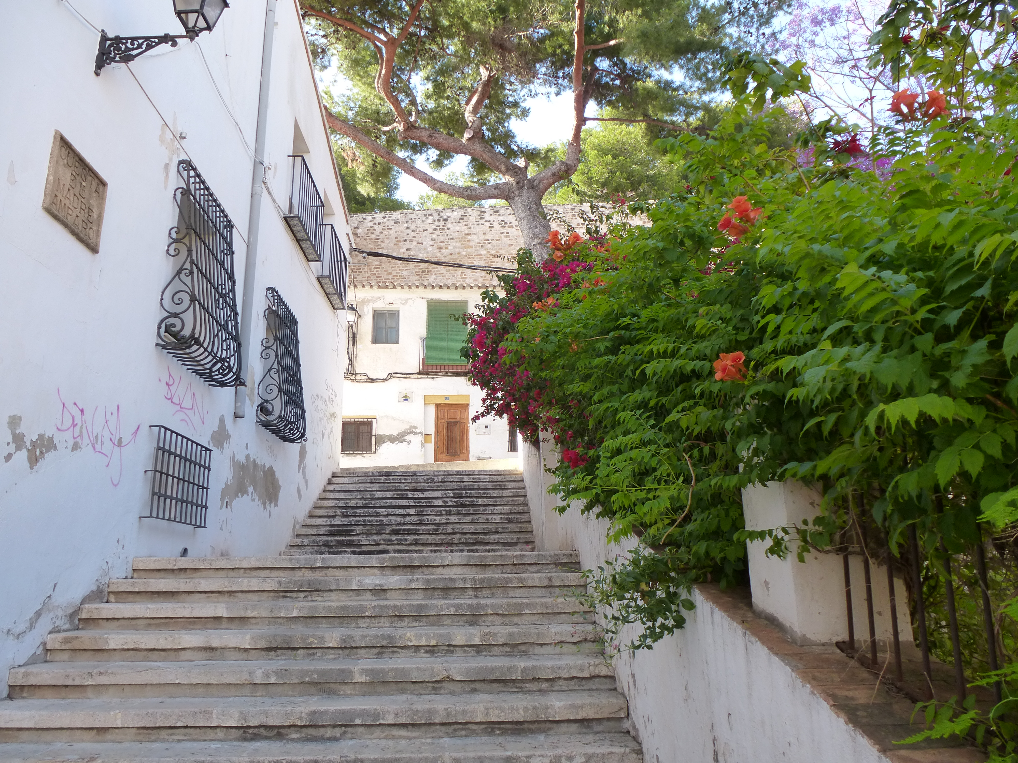 denia